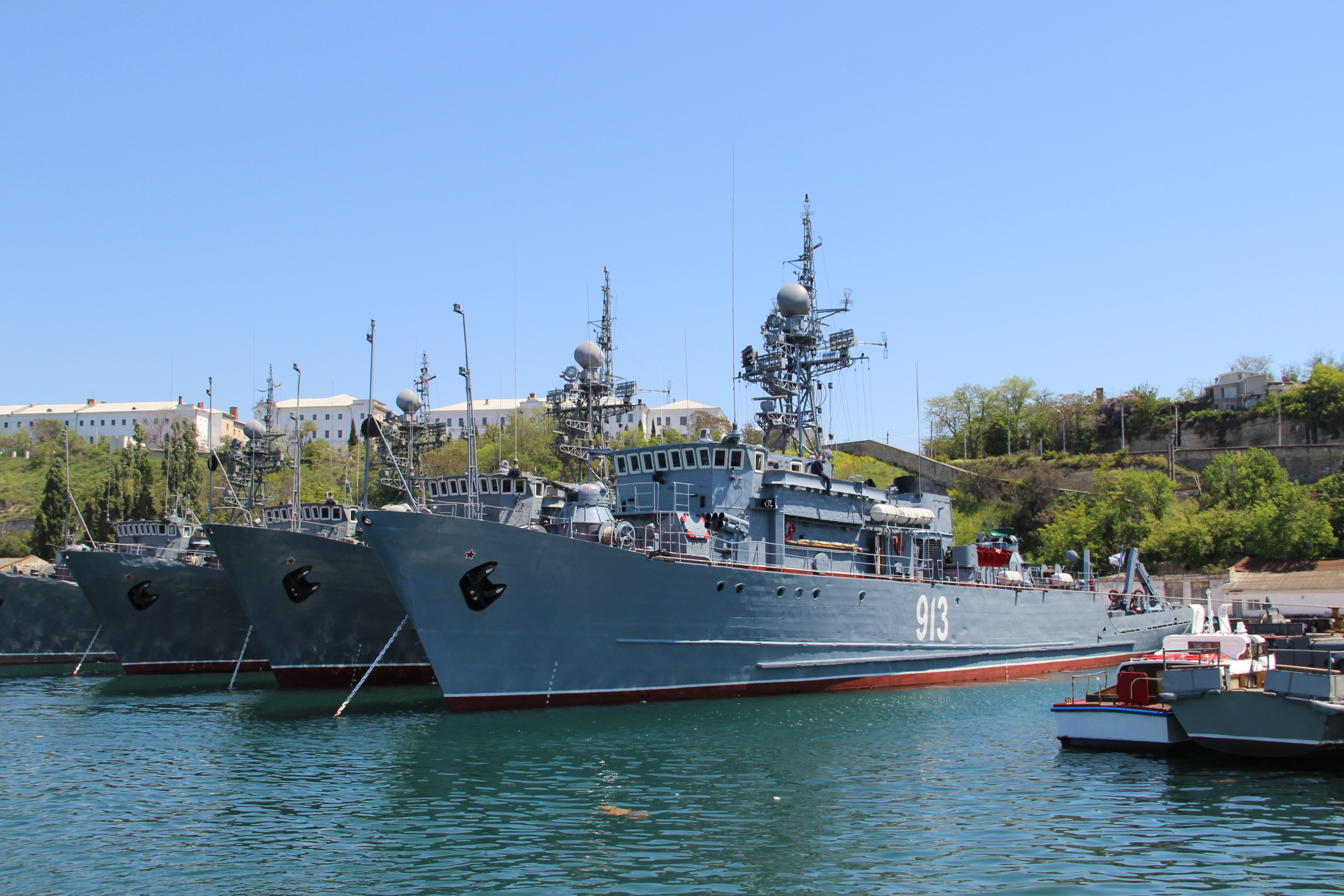 418 дивизион тральщиков 68-ой бригады кораблей ОВР. Севастополь. Крым. Россия. Май 2015